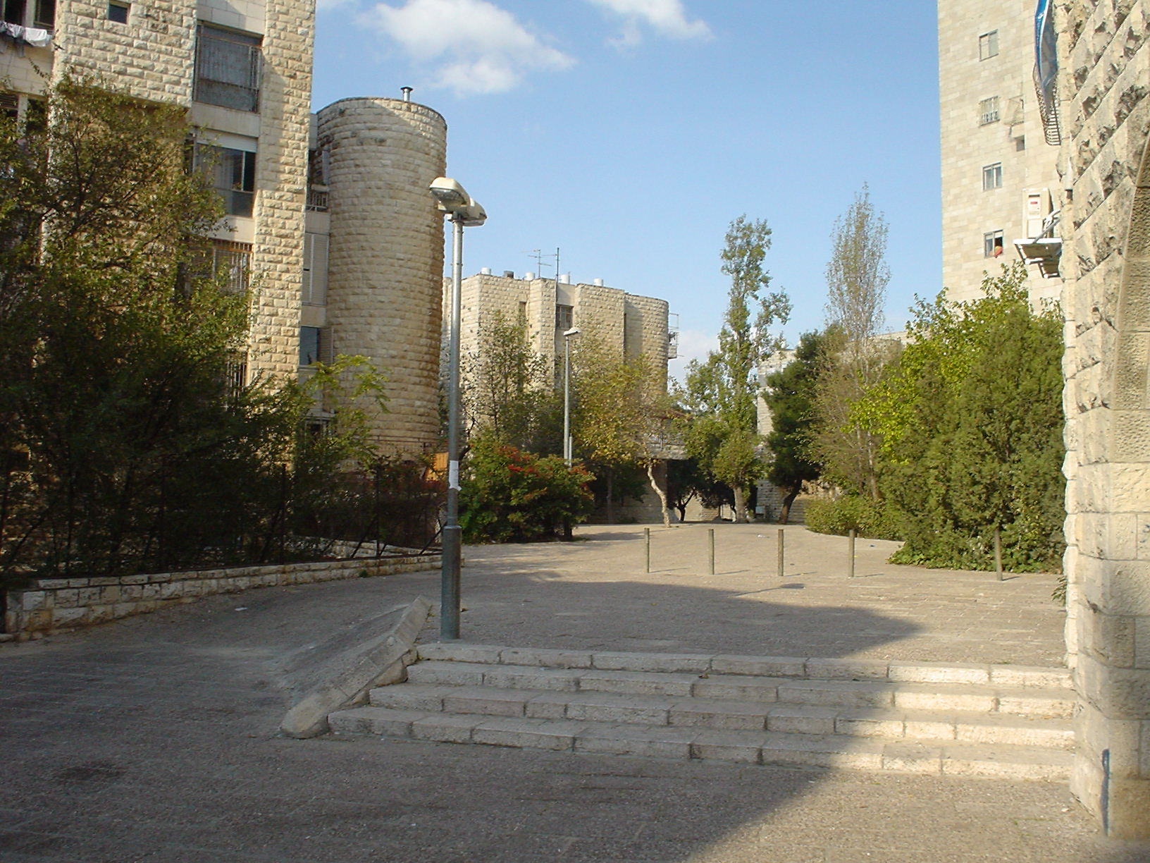 שכונת מעלות דפנה ירושלים